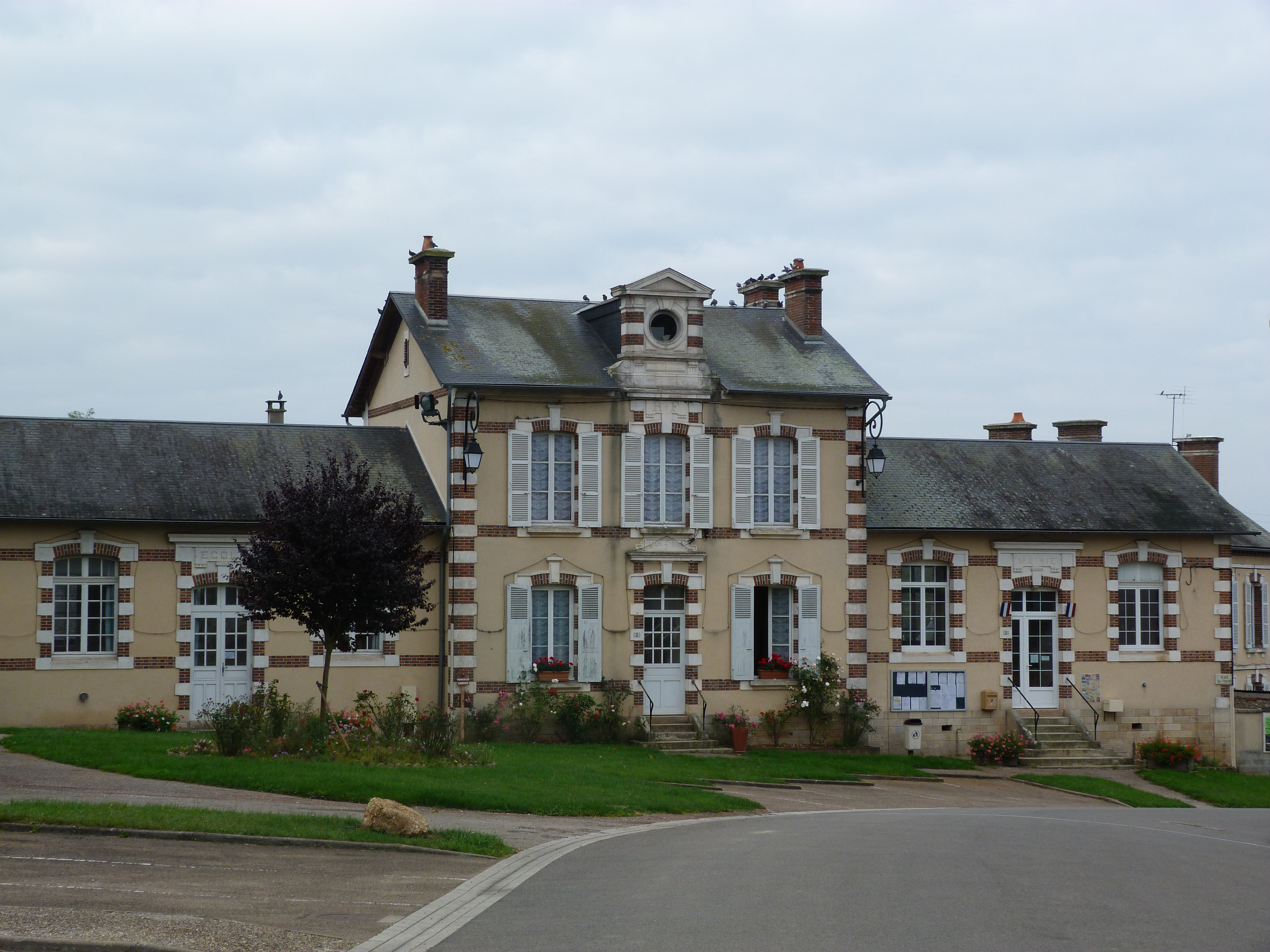 Urbodomo